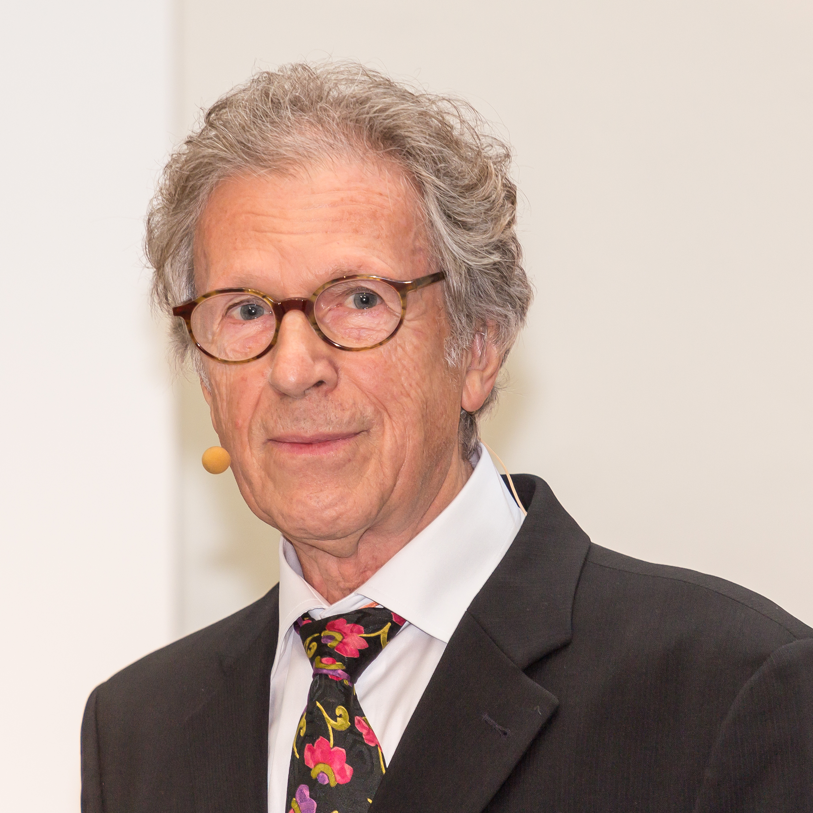 Verleihung des Art Cologne Preises 2016 an den Galeristen und Kunsthändler Raimund Thomas in der Piazette des Historischen Rathauses von Köln Foto: Preisträger Raimund Thomas